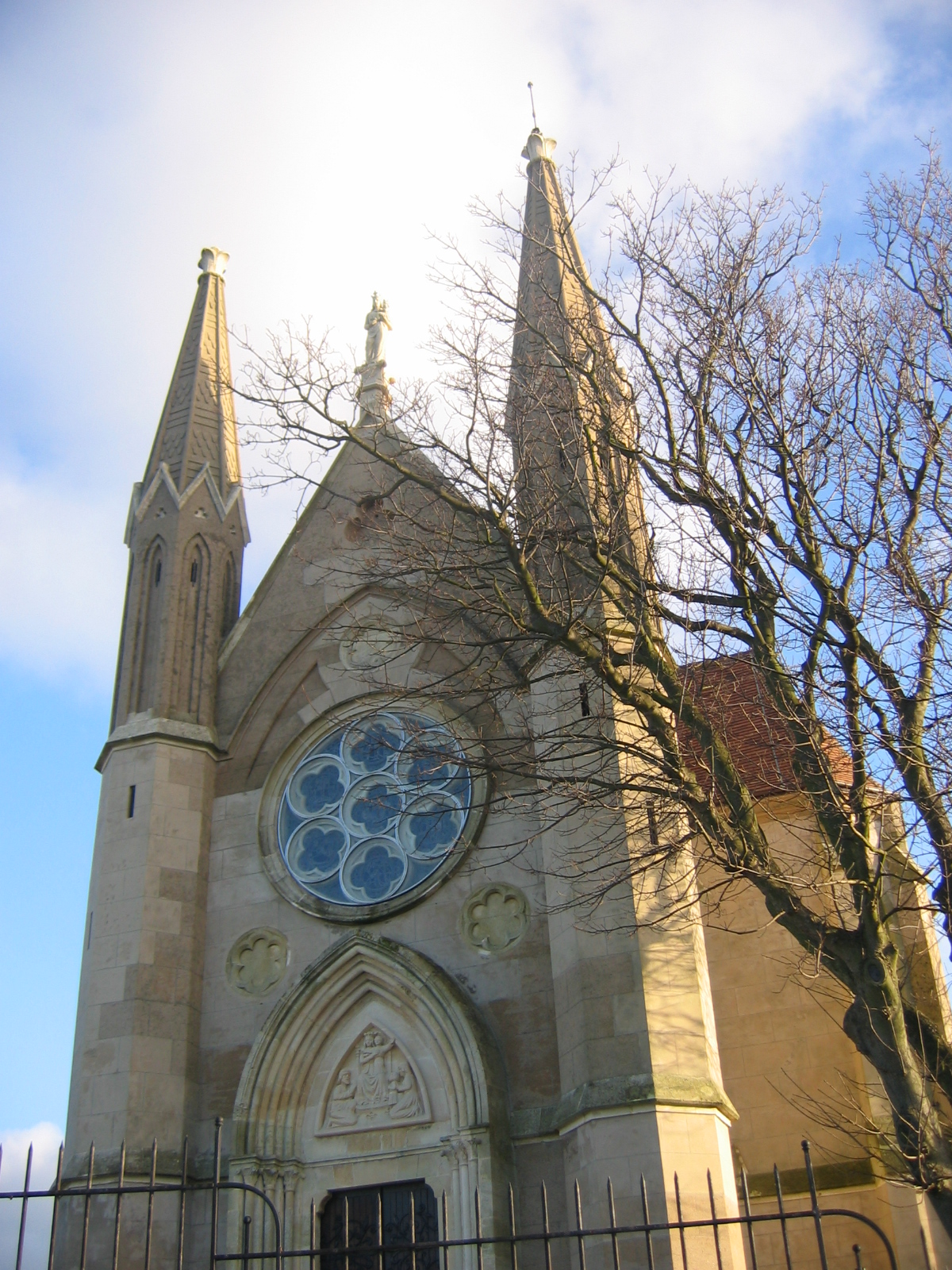 Façade de la chapelle Notre-Dame-des-Flots, Sainte-Adresse, Seine-Maritime